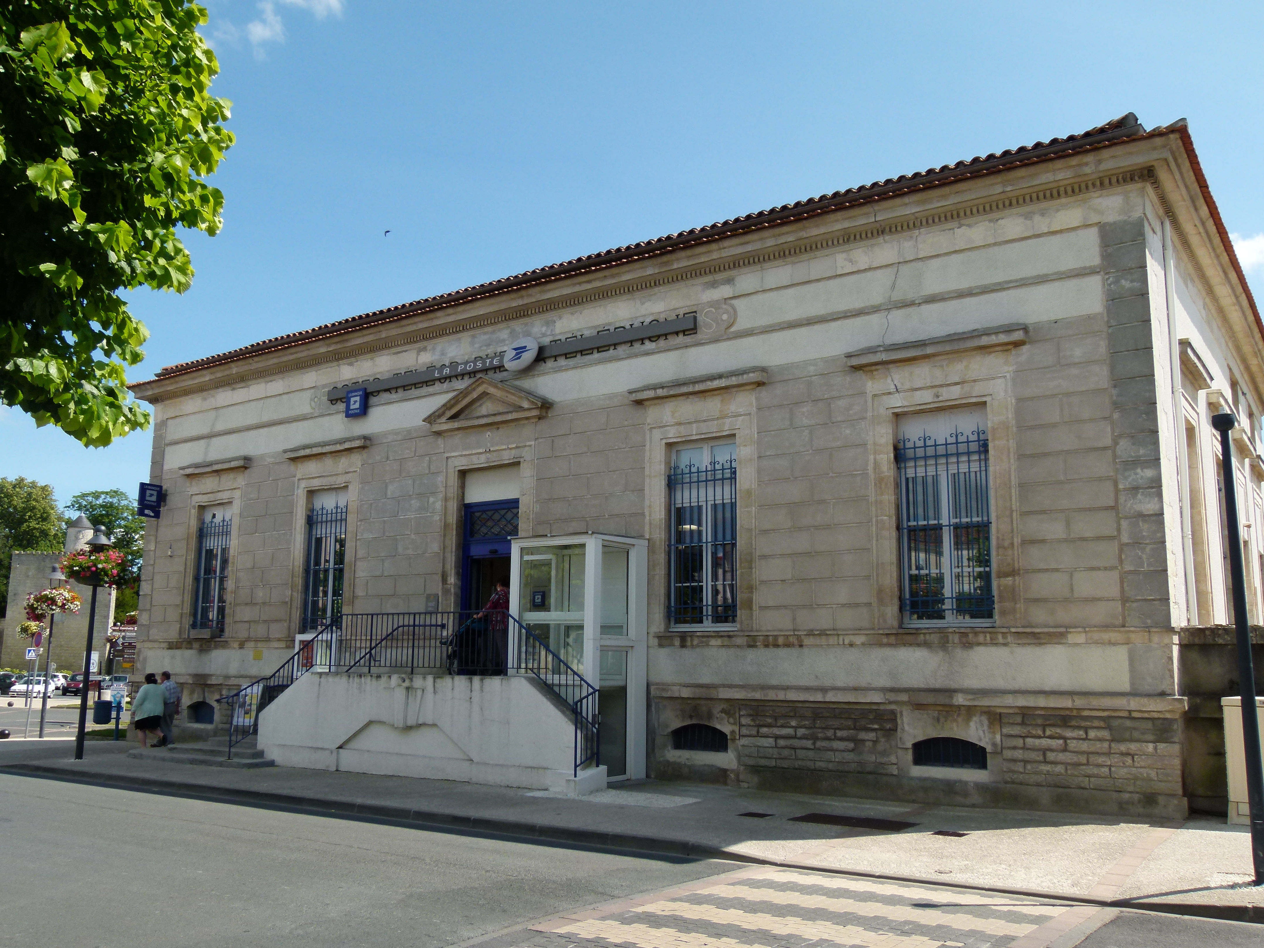 Le bâtiment de La Poste à Surgères, construit en 1822, est occupé par l'administration postale depuis la Libération.